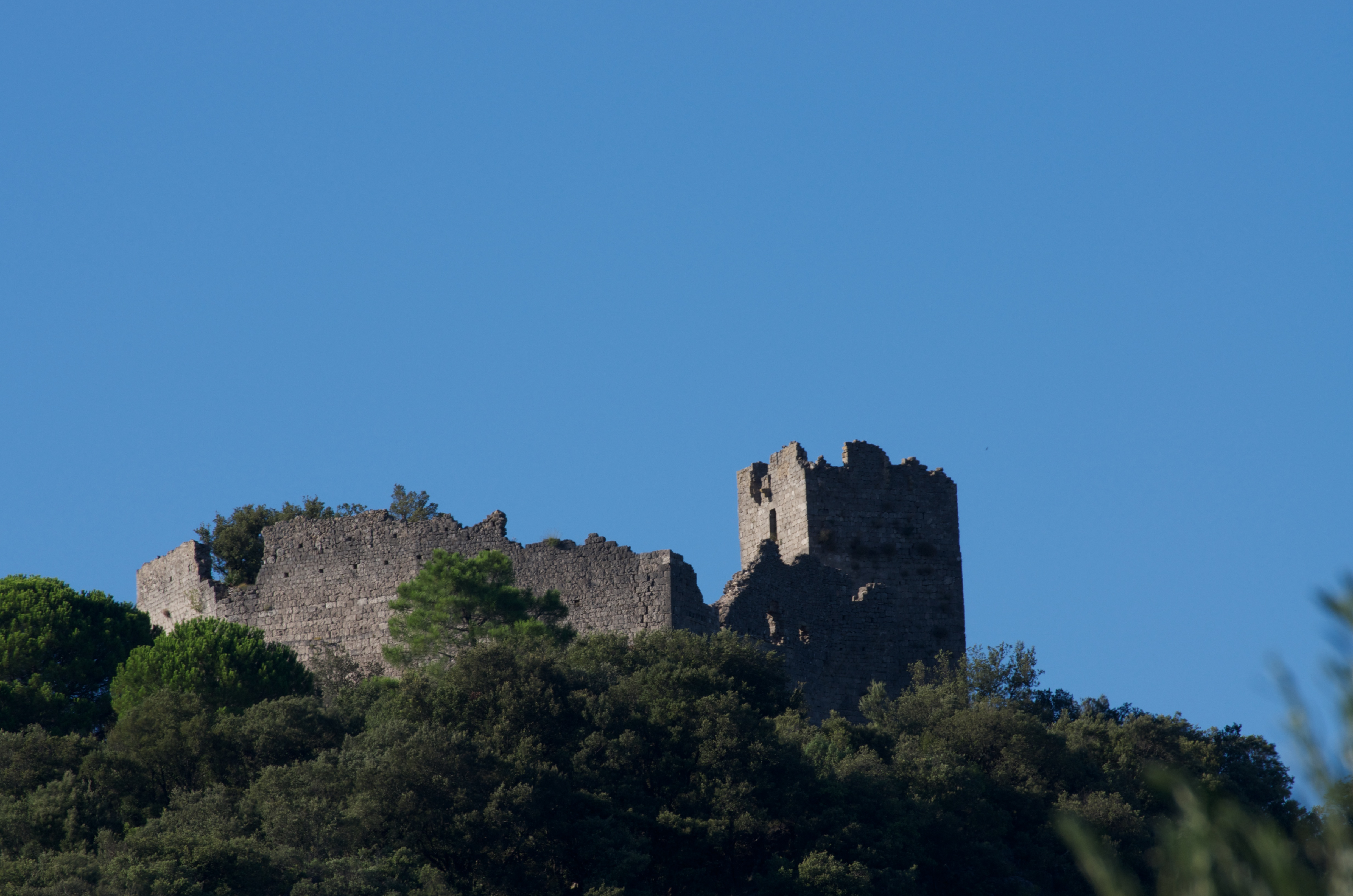 Vue des restes du château de Fressac